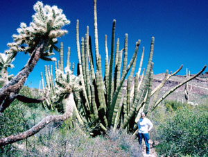 Organ Pipe cactus in Arizona